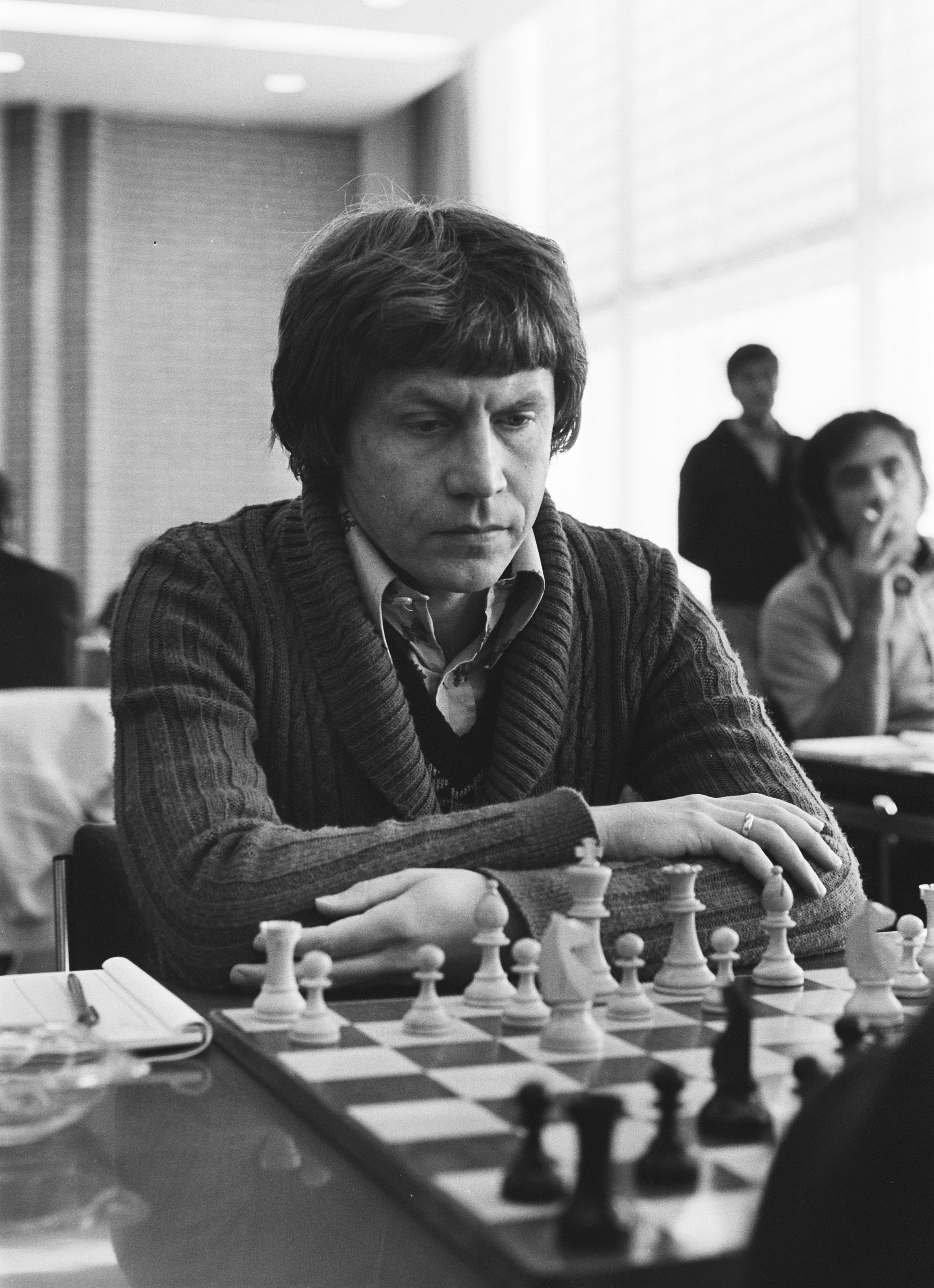 Adorján, András, IBM schaaktoernooi 3e ronde.